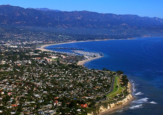 Aerial photo: Santa Barbara, California